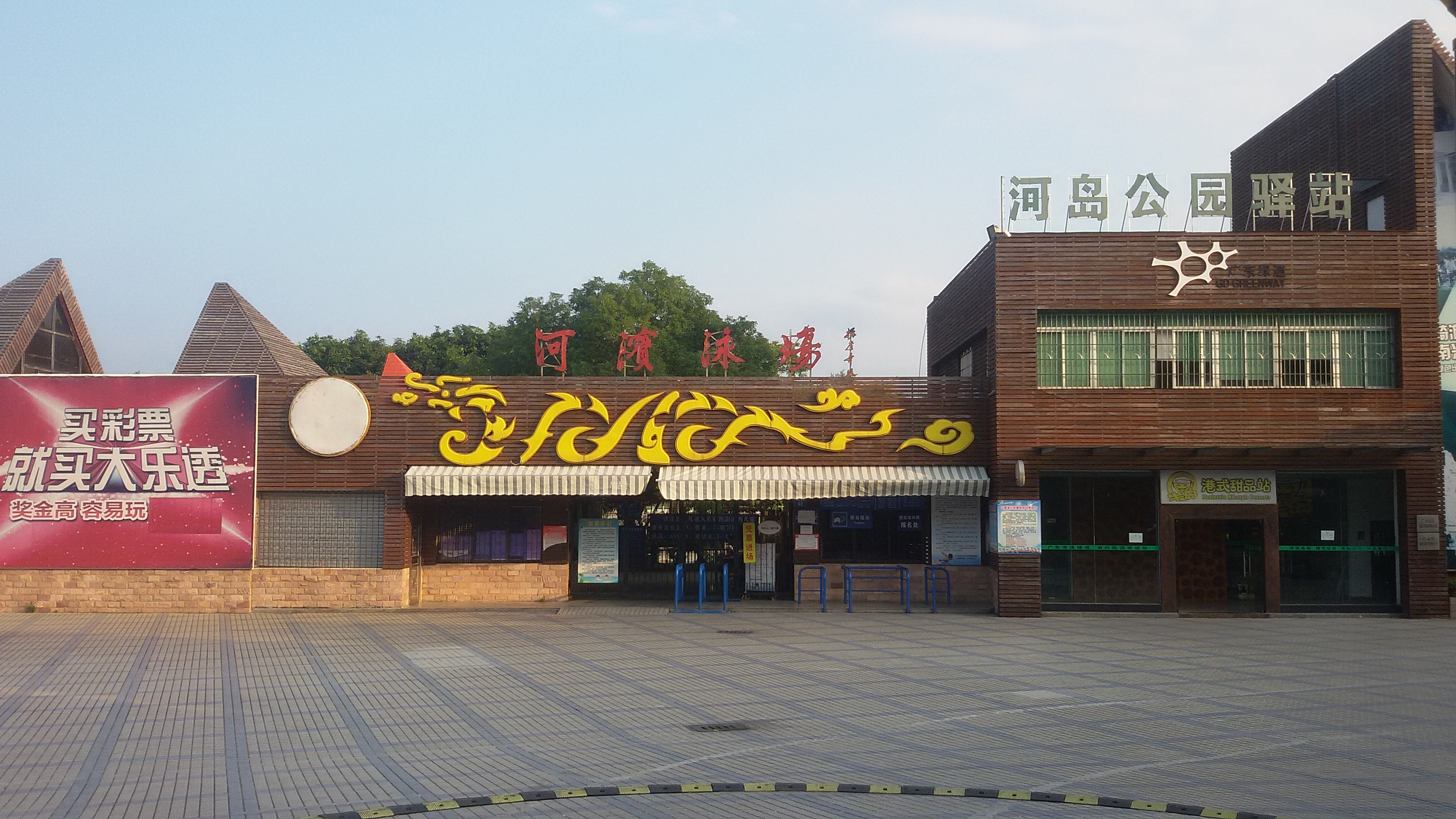 粵語: 河滨泳场门口